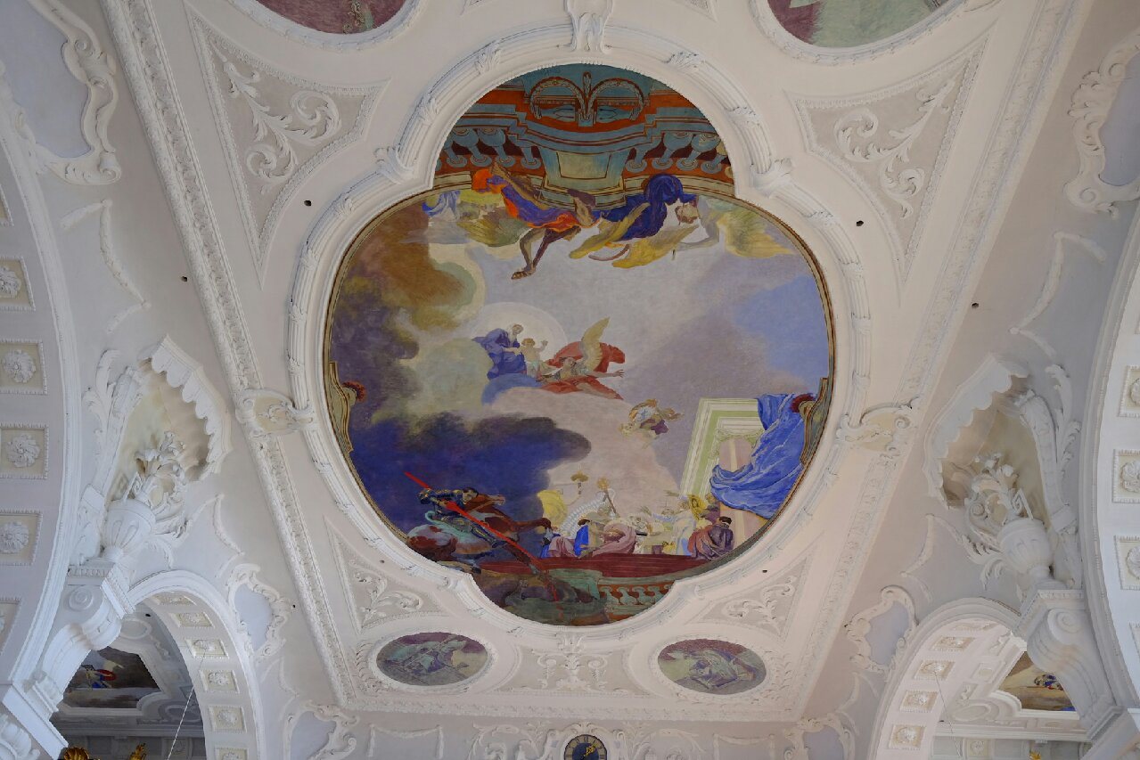 Wasserburg St Georg